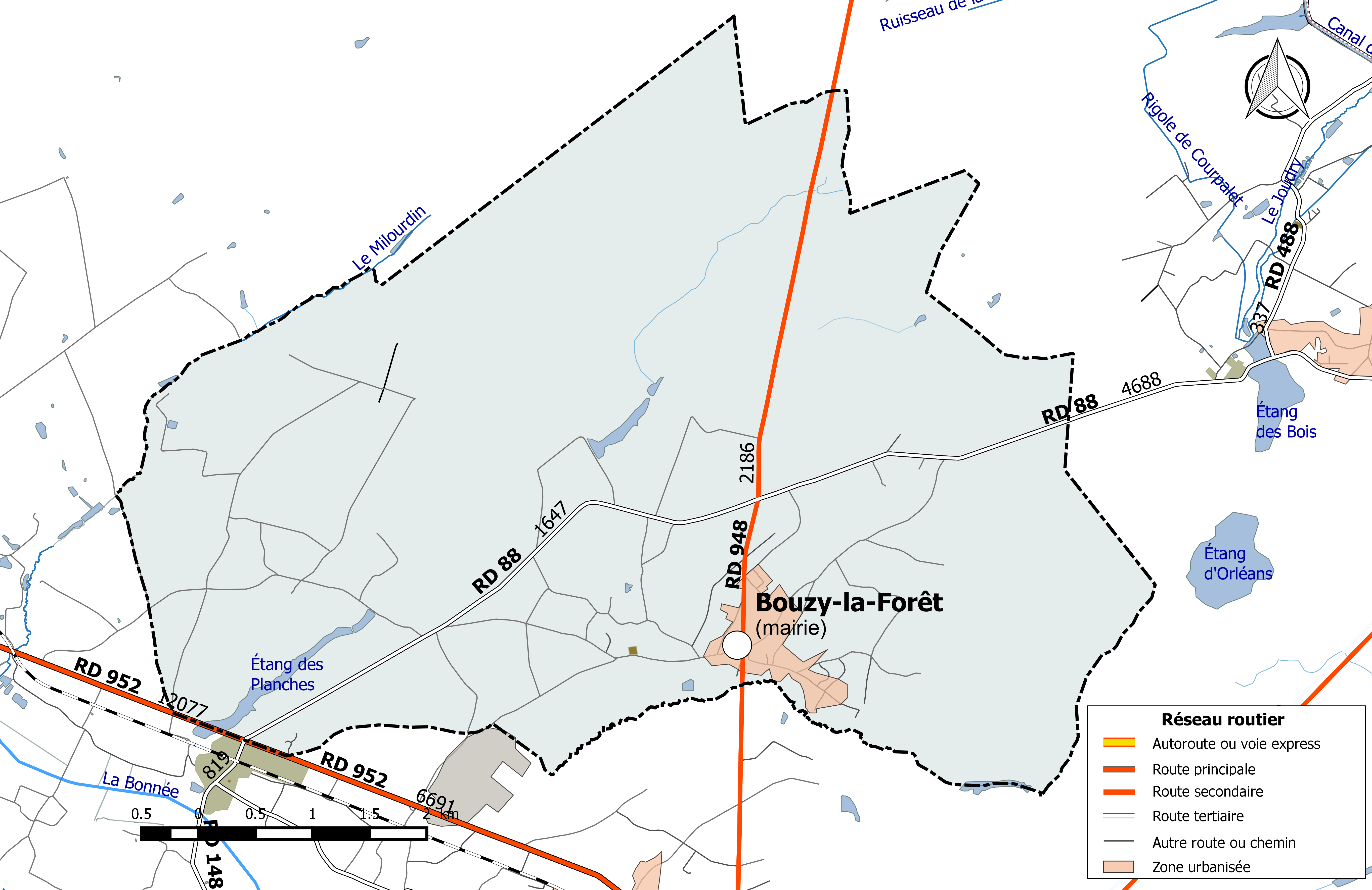 Carte du réseau routier de la commune de Bouzy-la-Forêt.